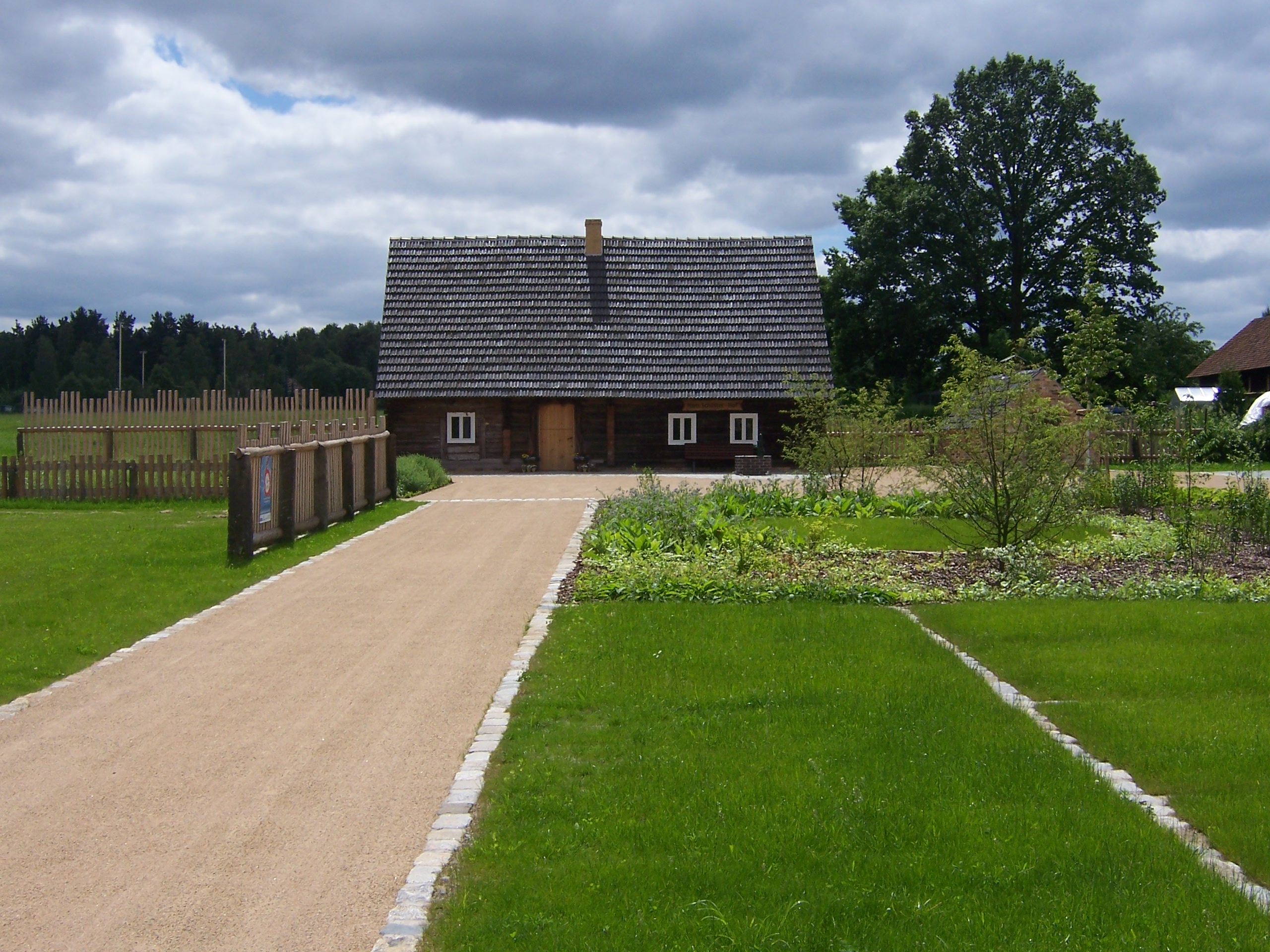 Der umgesetzte „Hans Schuster-Hof“ in Trebendorf im Juni 2010